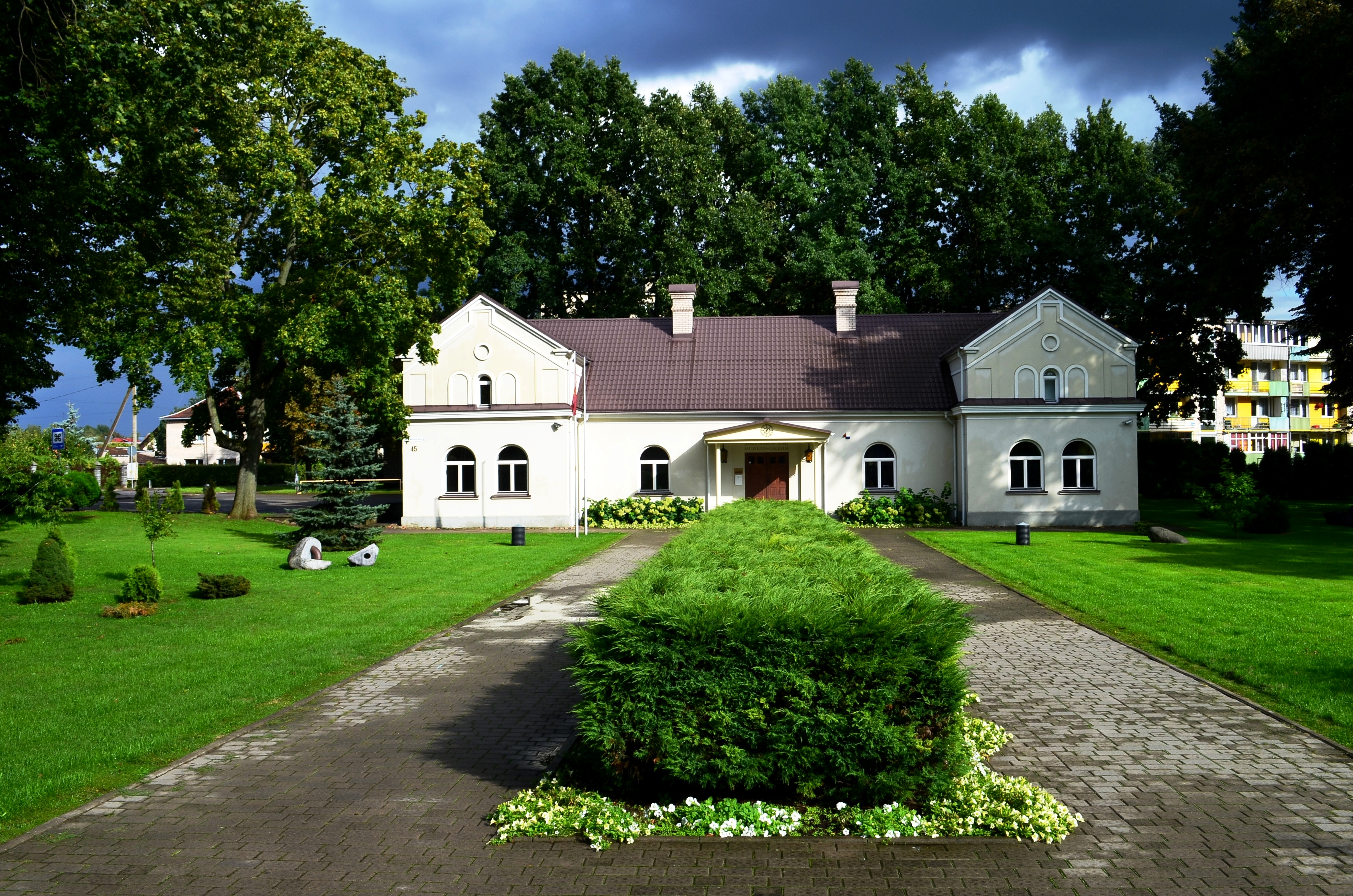 Janinos Monkutės muziejus Kėdainiuose